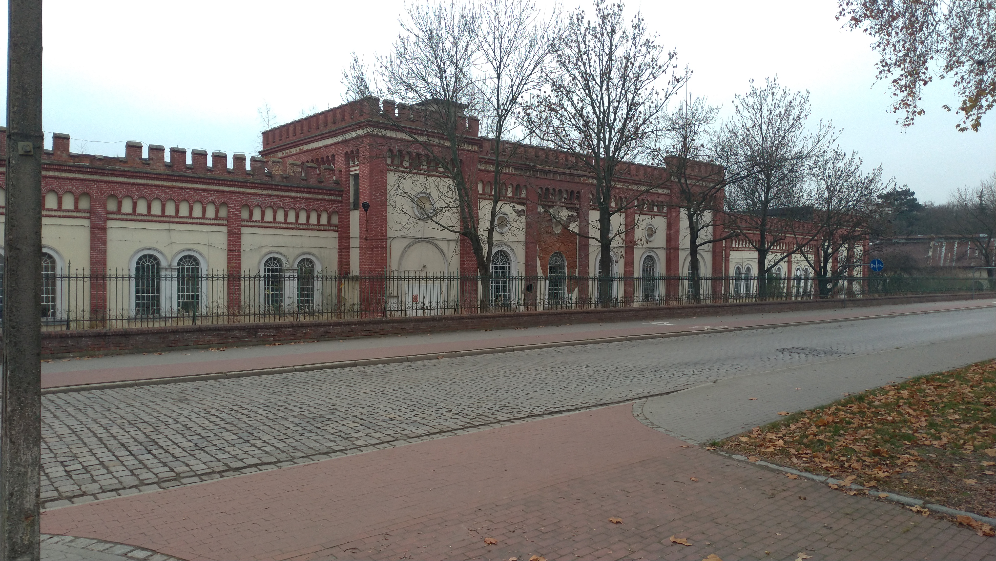 Tkalnia ZPB "Frotex" w Prudniku.